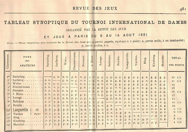 Итоговая таблица шашечного турнира 1891 года в Париже